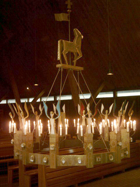 Jerusalemleuchter. Das Bild befindet sich in der Ev. Apostelkirche zu Bocholt und steht somit in einem öffentlich zugänglichen Raum.